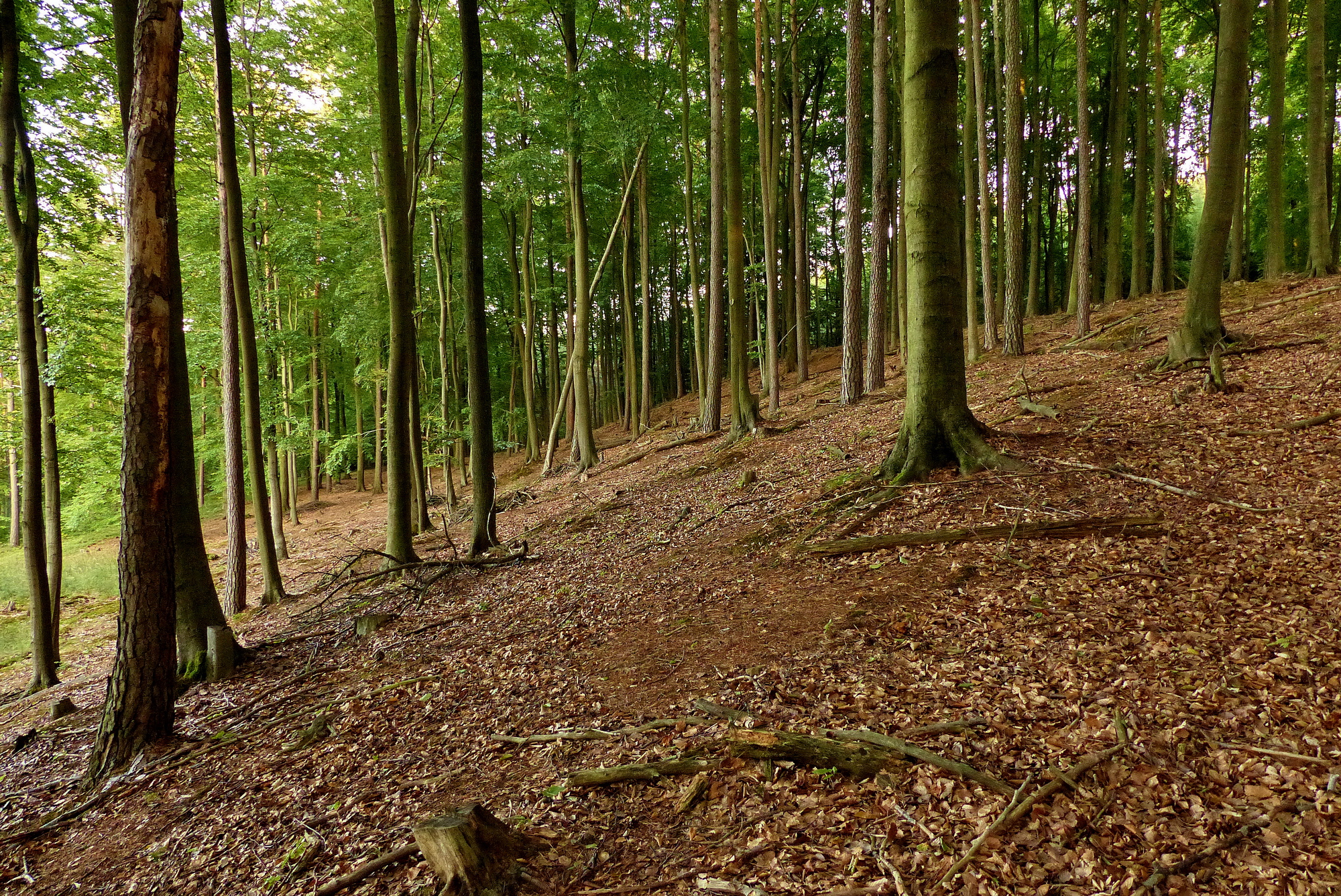 Severní svah Prosíčské horky.